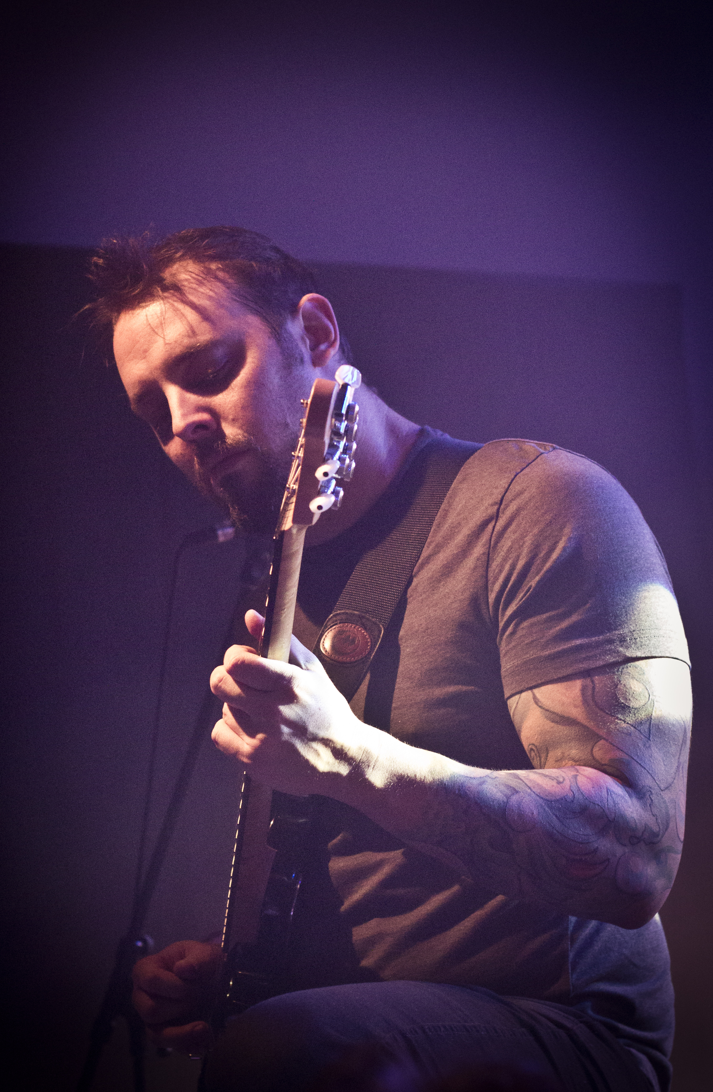 Shane Blay guitariste de Oh Sleeper au Blast of Eternity 2012.